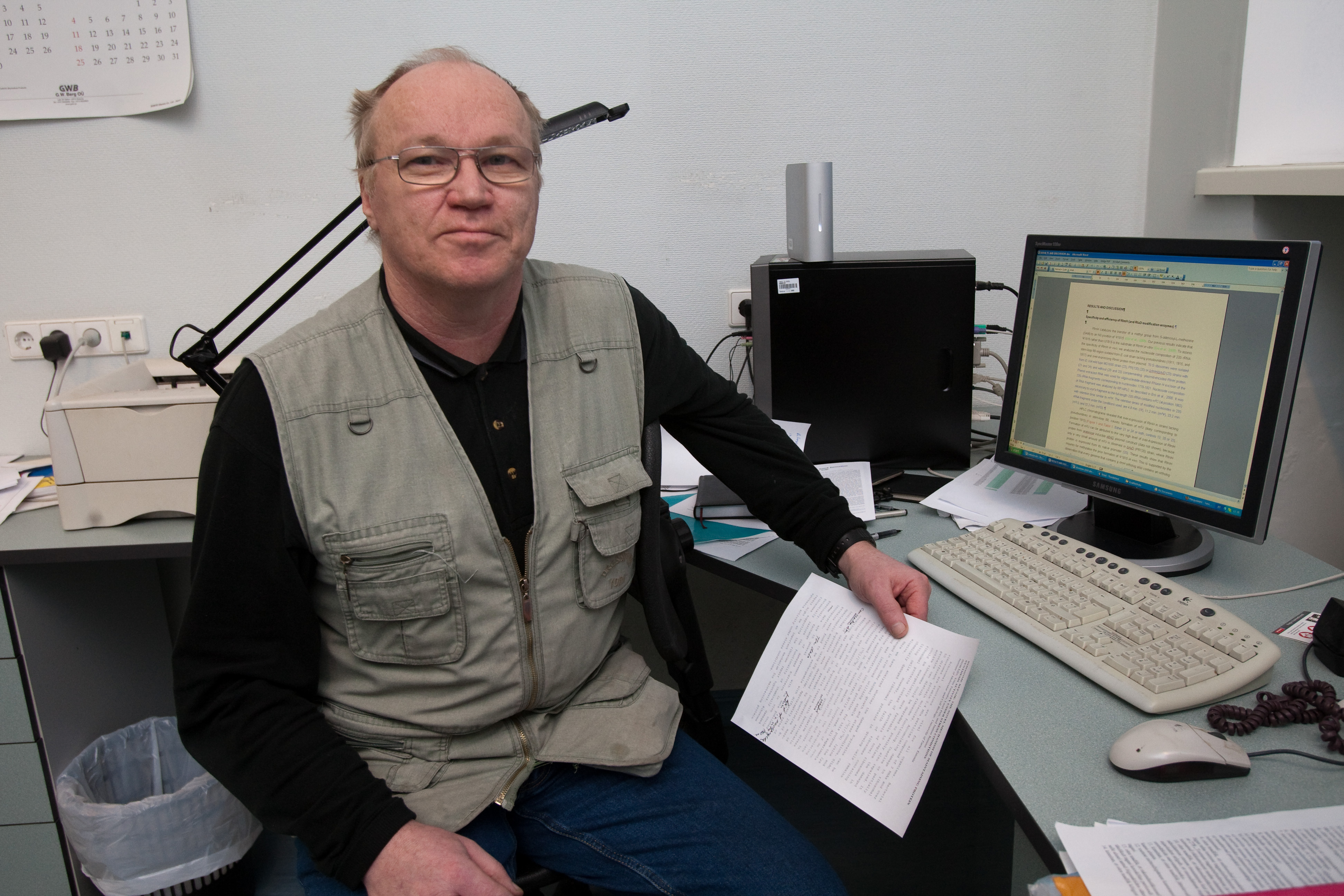 Tartu Ülikooli Molekulaar- ja Rakubioloogia Instituudi molekulaarbioloogia õppetool. Molekulaarbioloogia õppetooli juhataja professor Jaanus Remme.